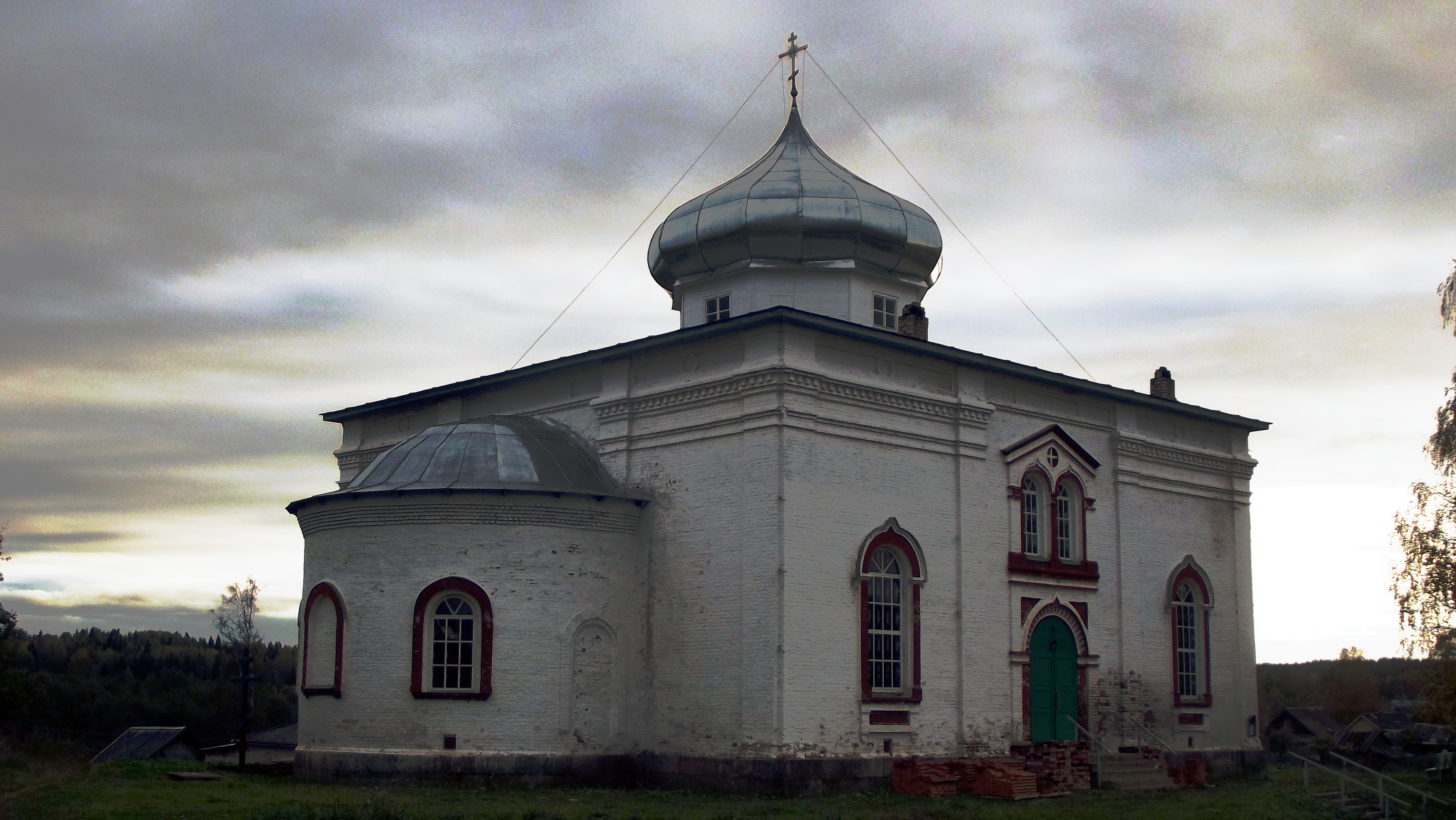 Церковь святителя Николая в д. Полищи Окуловского района